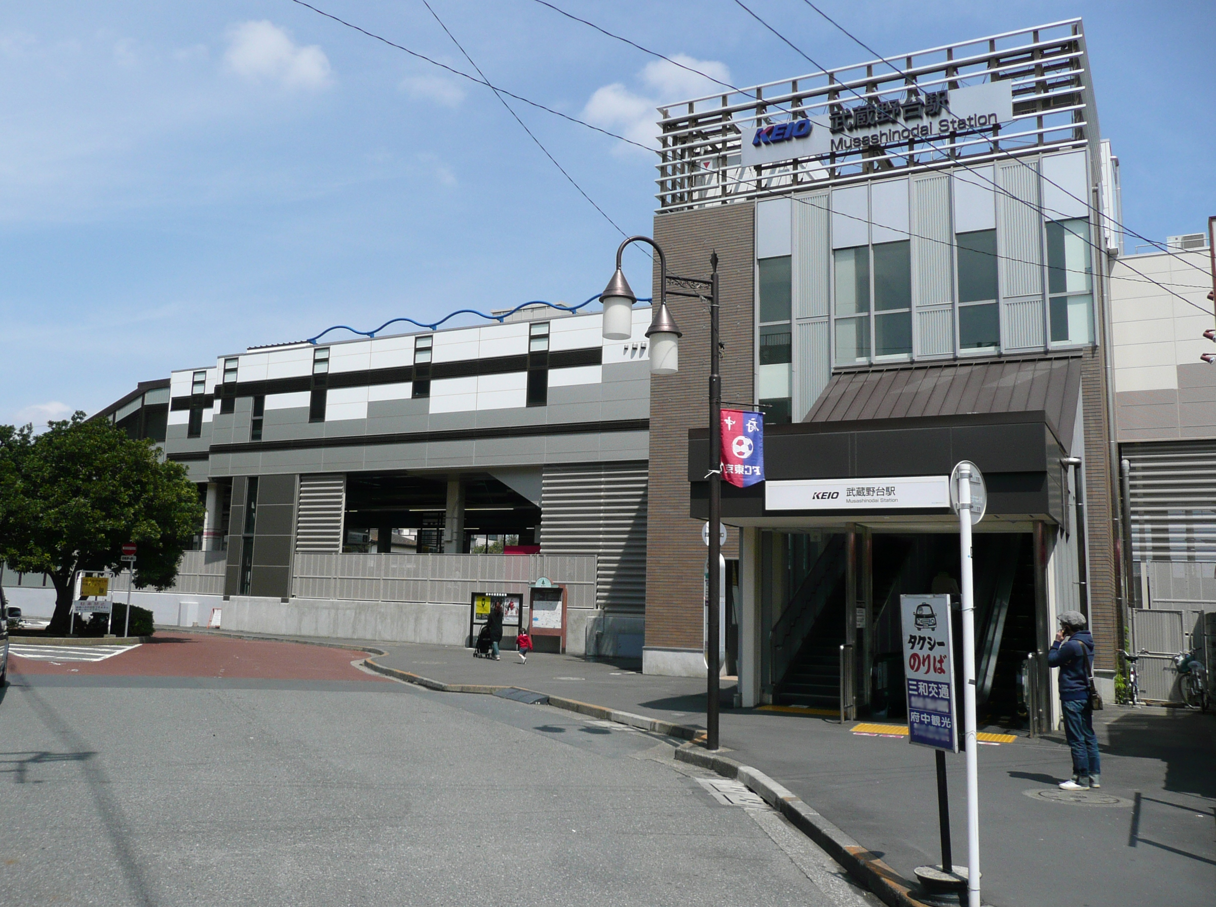 武蔵野台駅南口